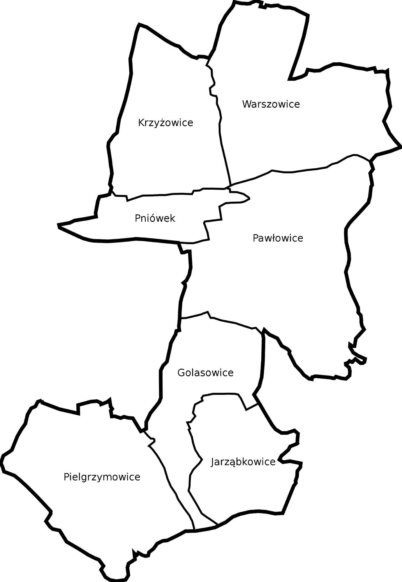 Sołectwa gminy Pawłowice w powiecie pszczyńskim